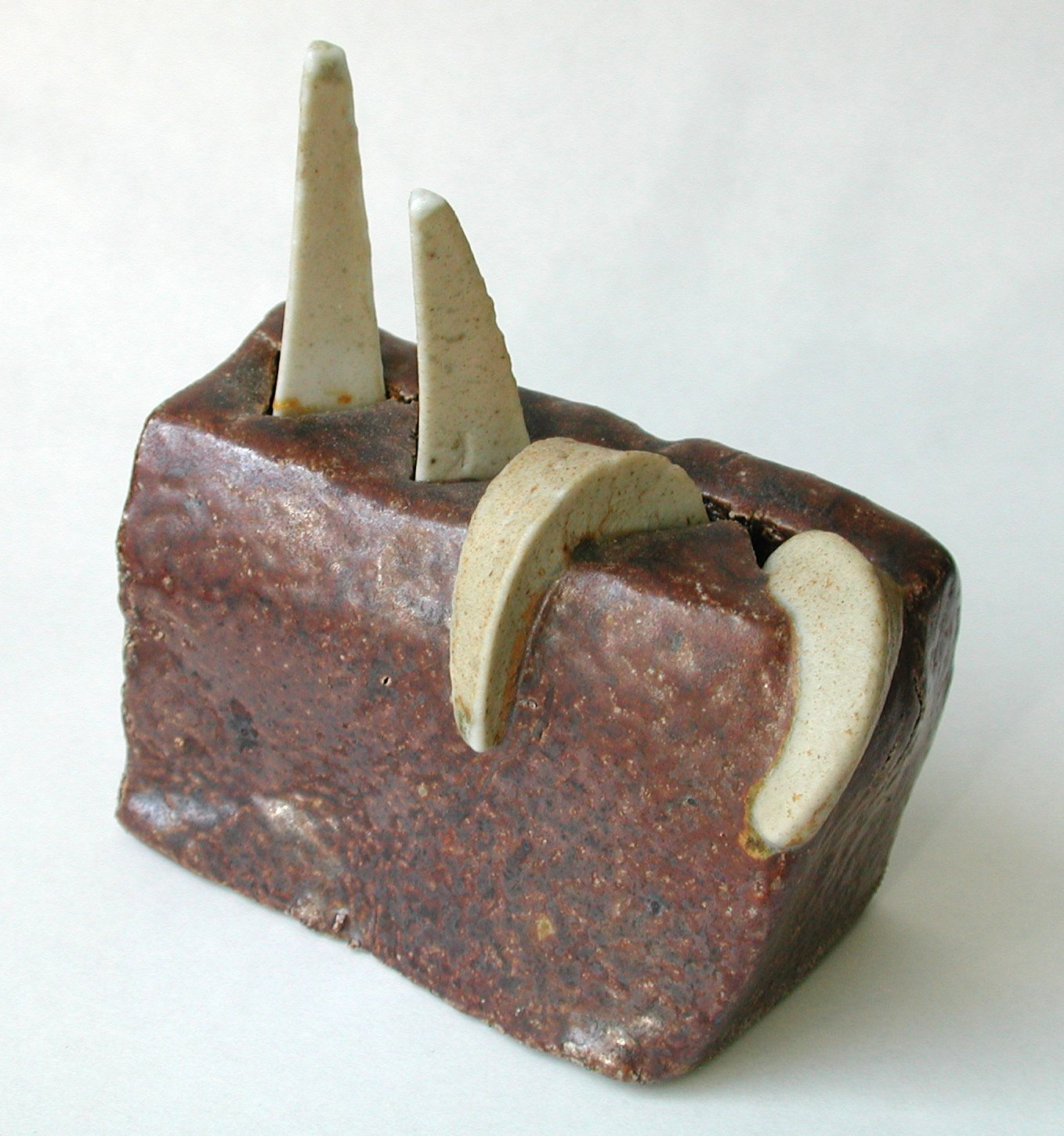 Segerkegel